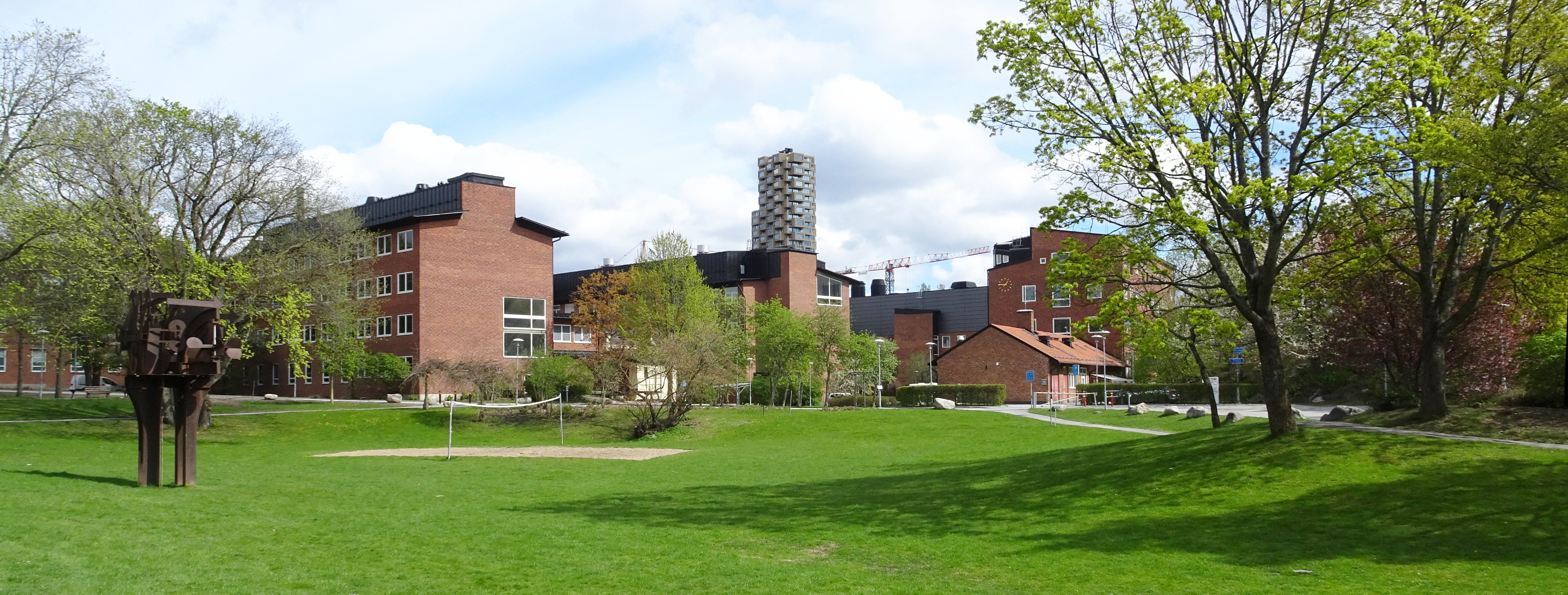 Campus Solna, Pelousen med byggnad för Omgivningsfysiologi (ursprungligen Flygfysiologi) i bakgrunden. Längst bort reser sig en av Norra Tornen. Till vänster står Per-Olof Ultvedts skulptur "Trasig klocka".